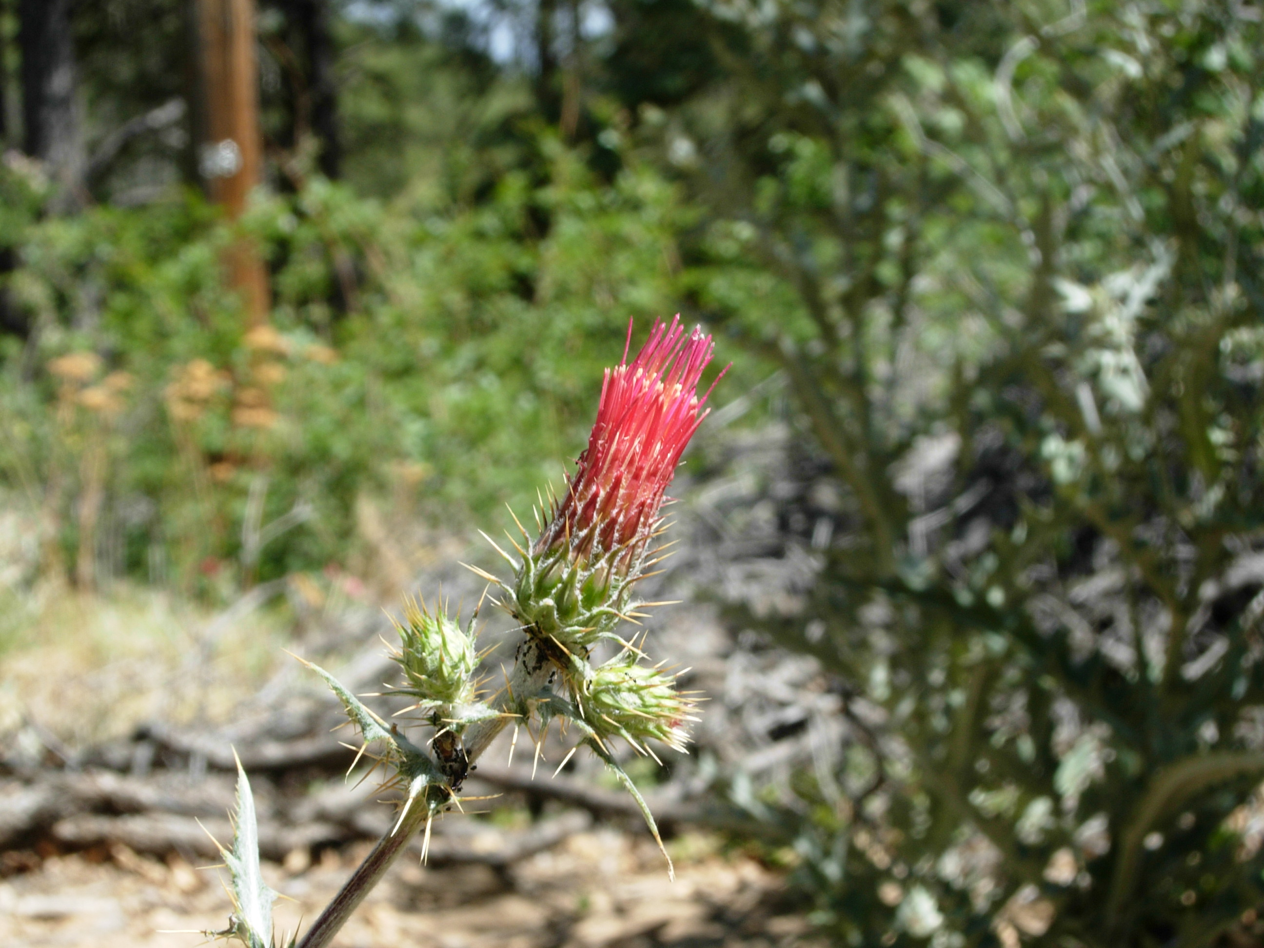 Cirsium arizonicum